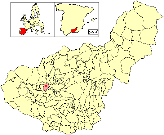 Situación de la localidad de El Jau (en el municipio de Santa Fe) respecto a la provincia de Granada, en España.